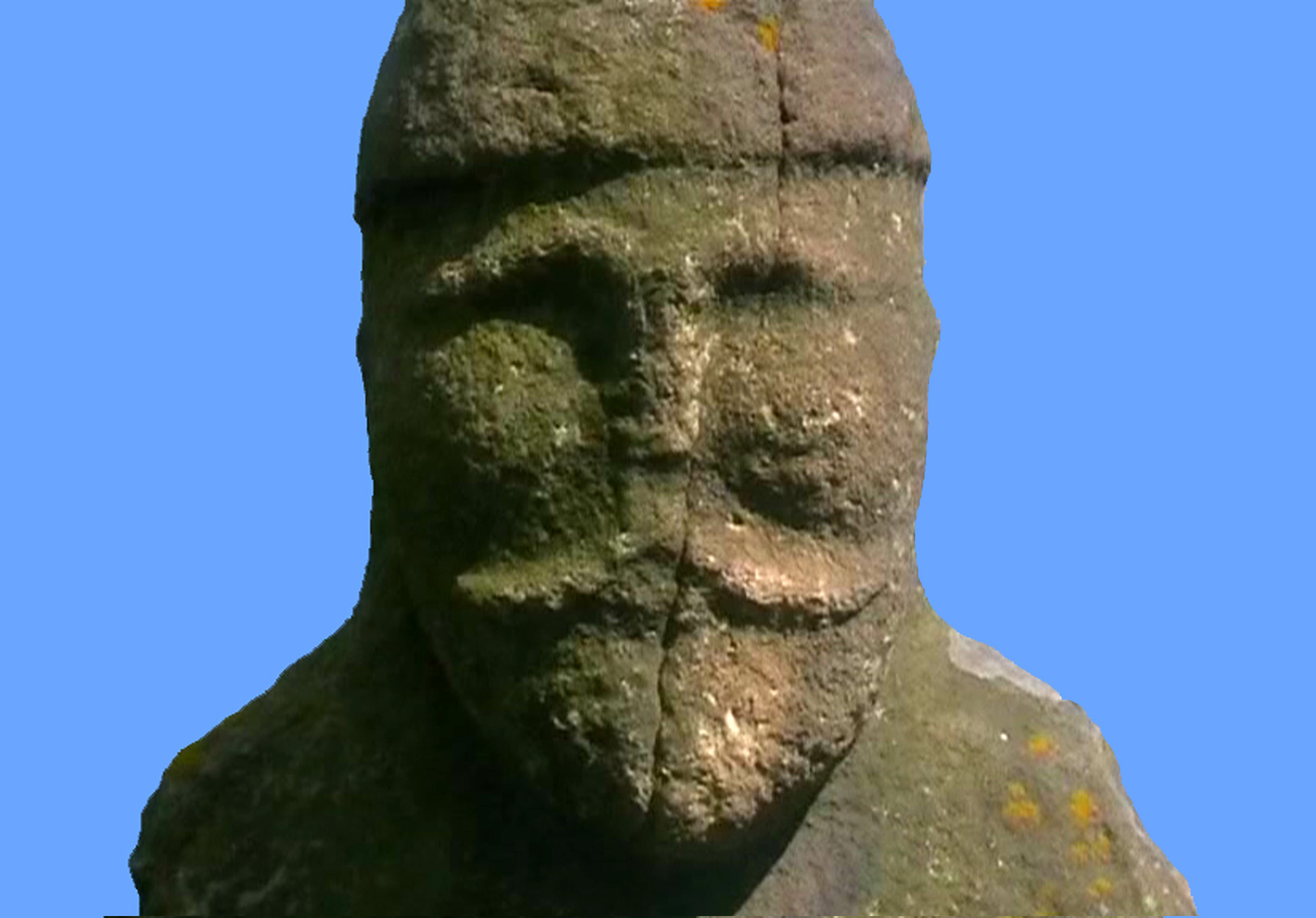 Kipchak stone baba in Luhansk